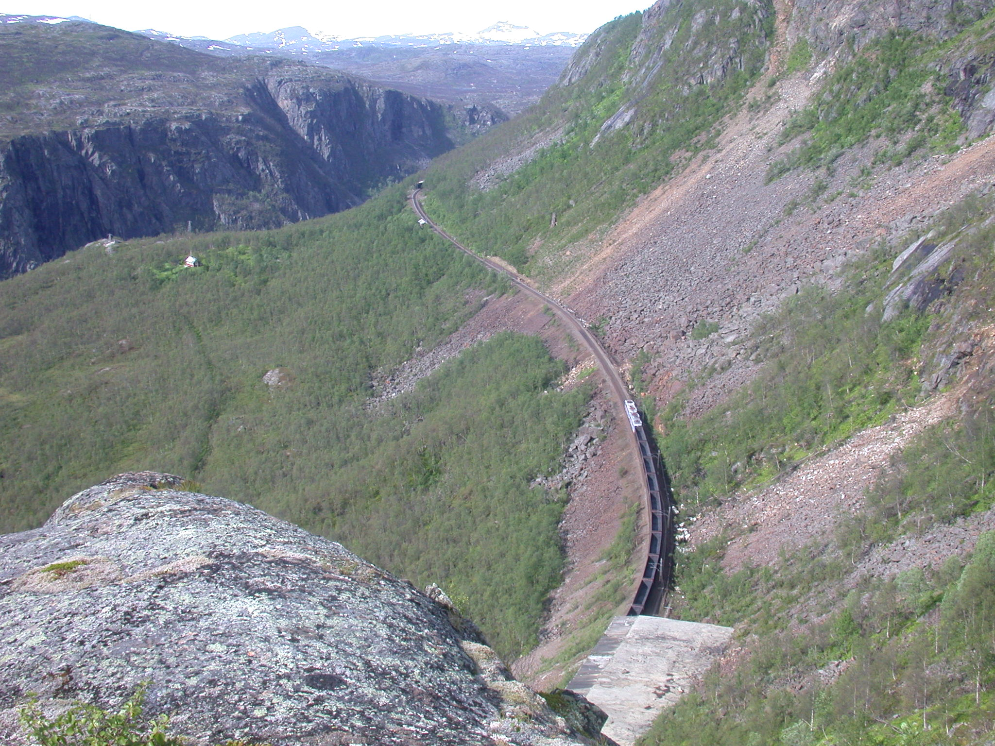 Tomt Northland-malmtog på vei oppover ved banens km 32. Mellom stasjonene Katterat og Bjørnfjell.